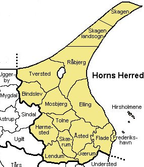 Horns Herred, Hjørring Amt, Denmark Source: Map by Svend-Erik Christiansen